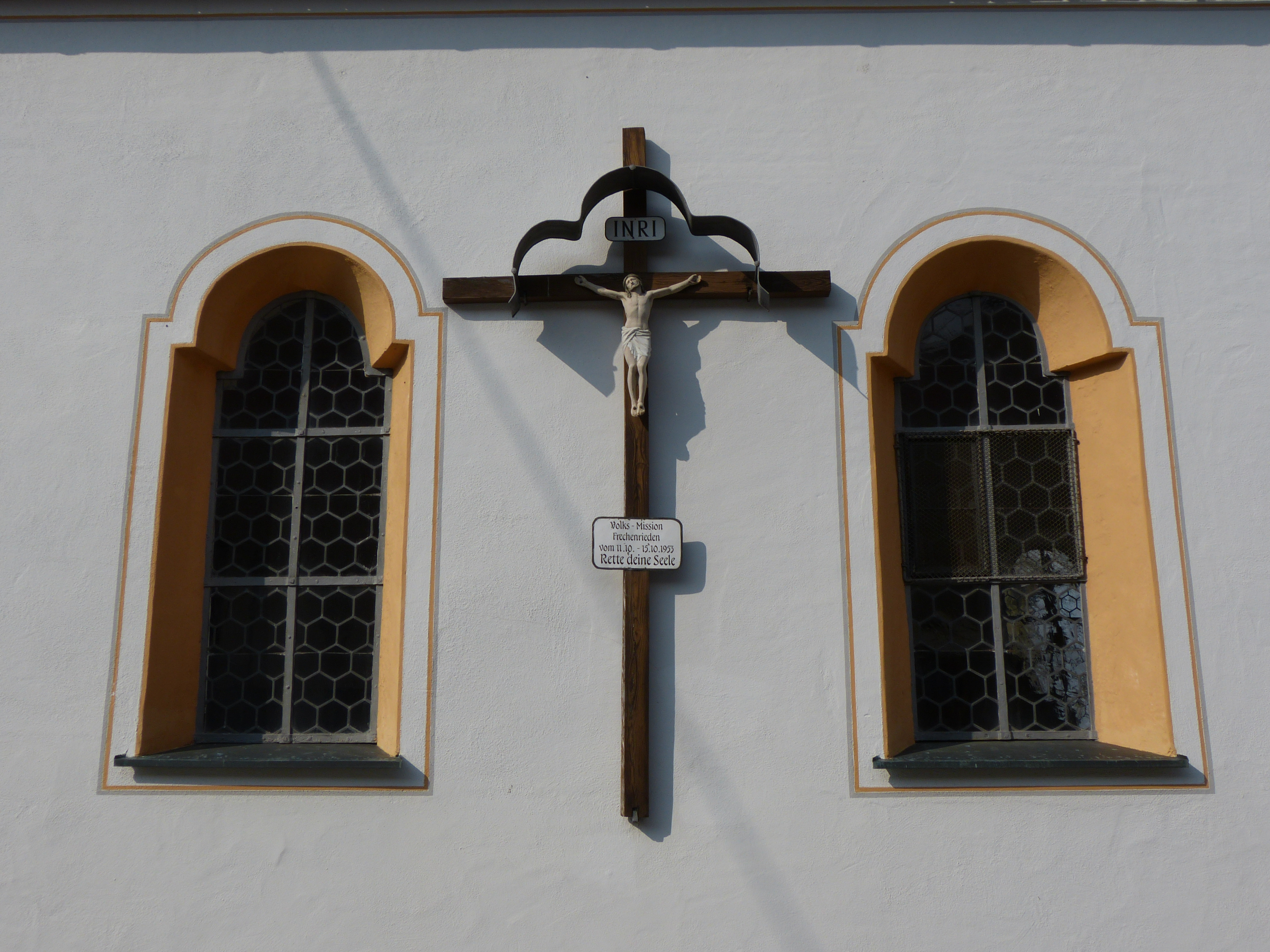 St. Peter, Altisried, Gemeinde Markt Rettenbach, Landkreis Unterallgäu, Bayern